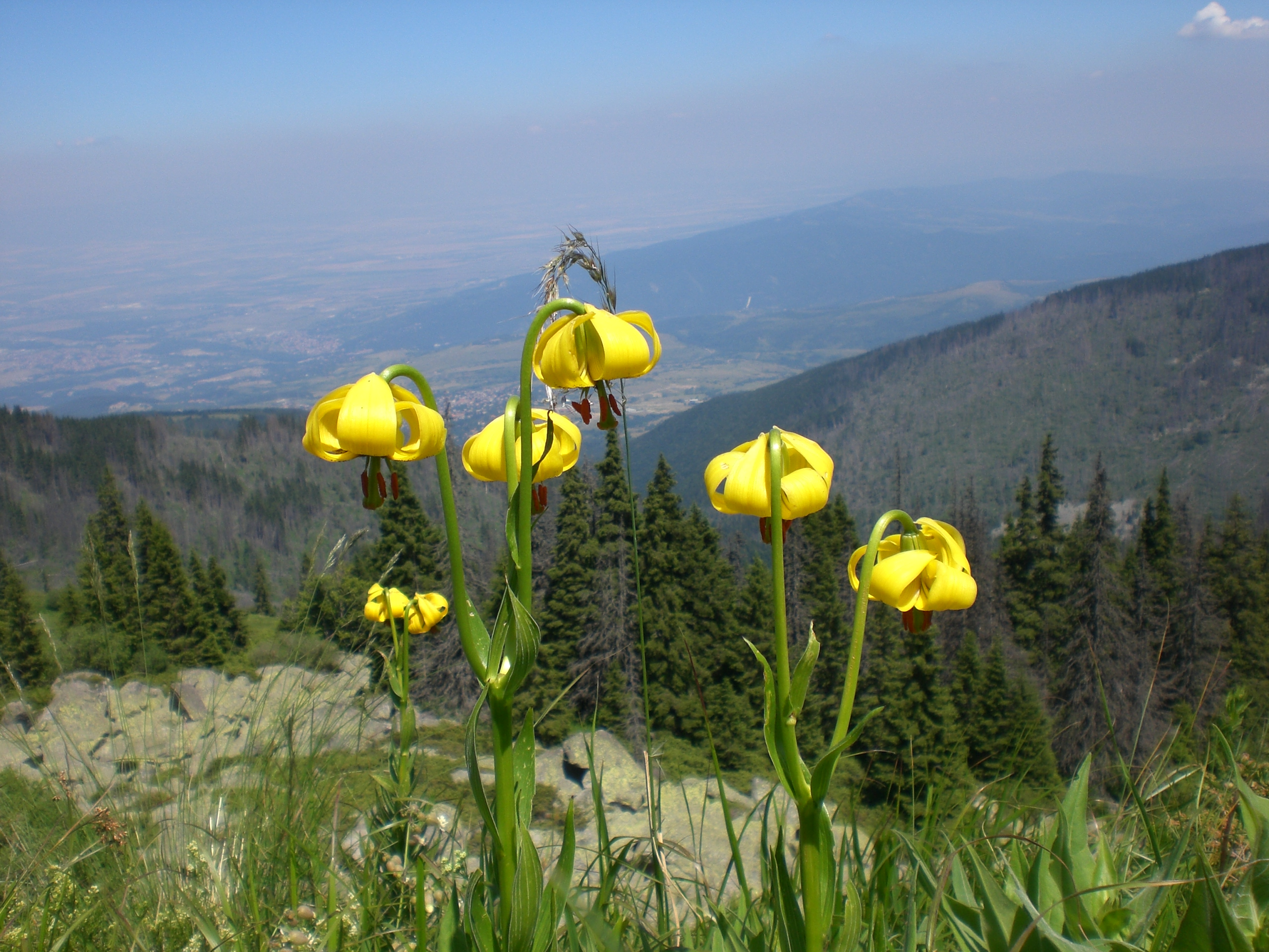 Бистришко бранище, Жълт планински крем (Lilium jankae). Балкански ендемит. Защитен вид по Закона за биологичното разнообразие.